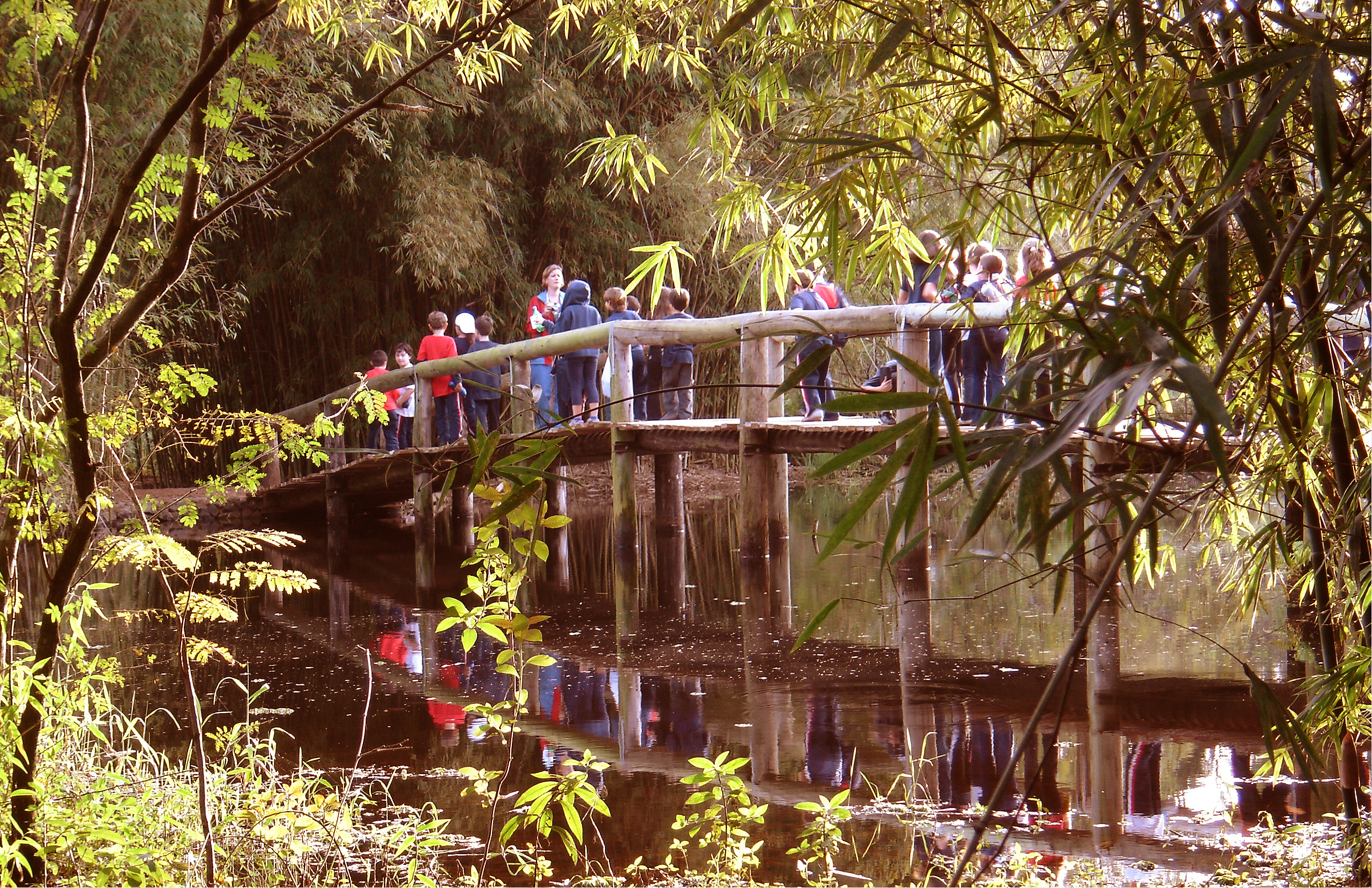 Jardim Botânico de Porto Alegre. Alunos do ensino fundamental sendo conduzidos em uma visita guiada, dentro dos projetos de educação ambiental promovidos pelo JB.